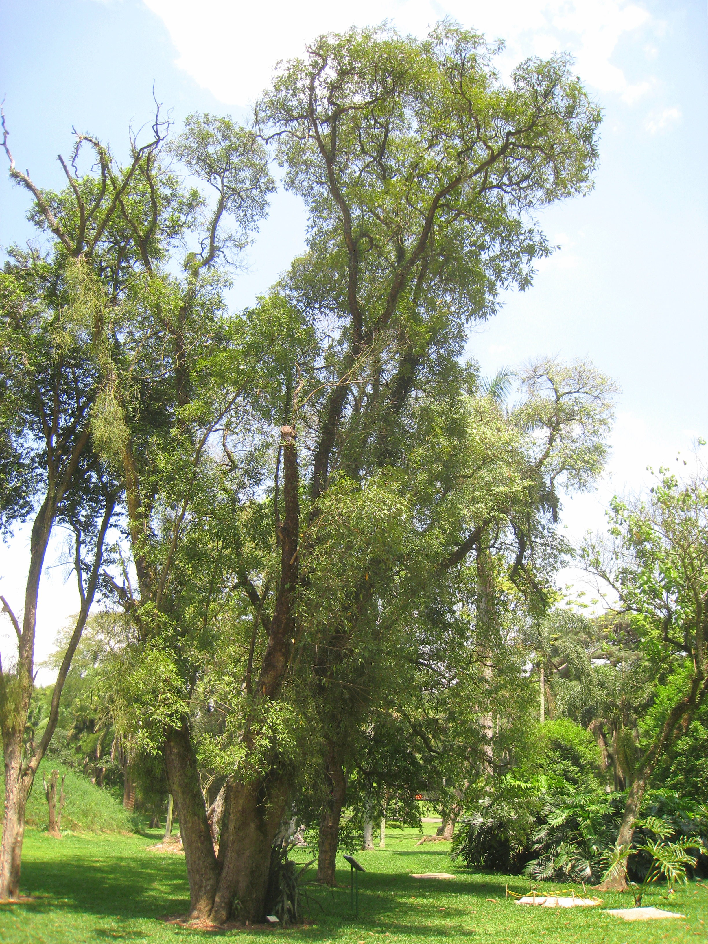 Ocotea porosa in the Jardim Botânico de São Paulo, São Paulo City, SP, Brazil.